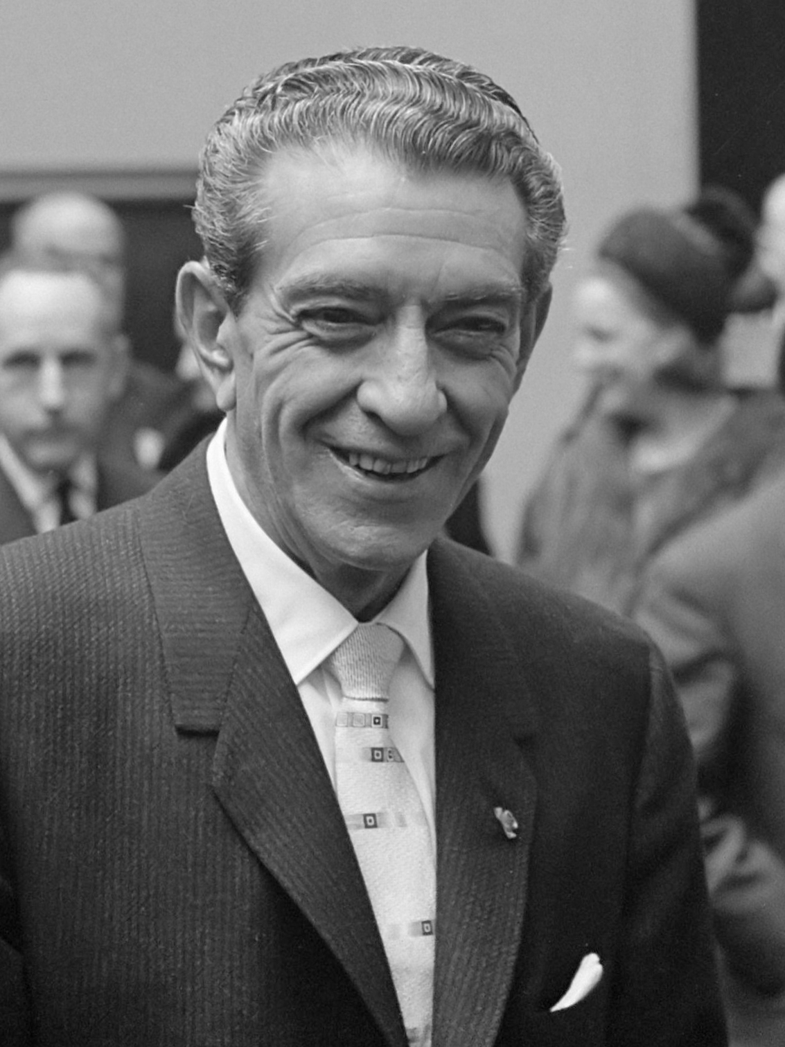 Bezoek President van Mexico President Lopez en Prins Bernhard in de Frans Halszaal 3 april 1963